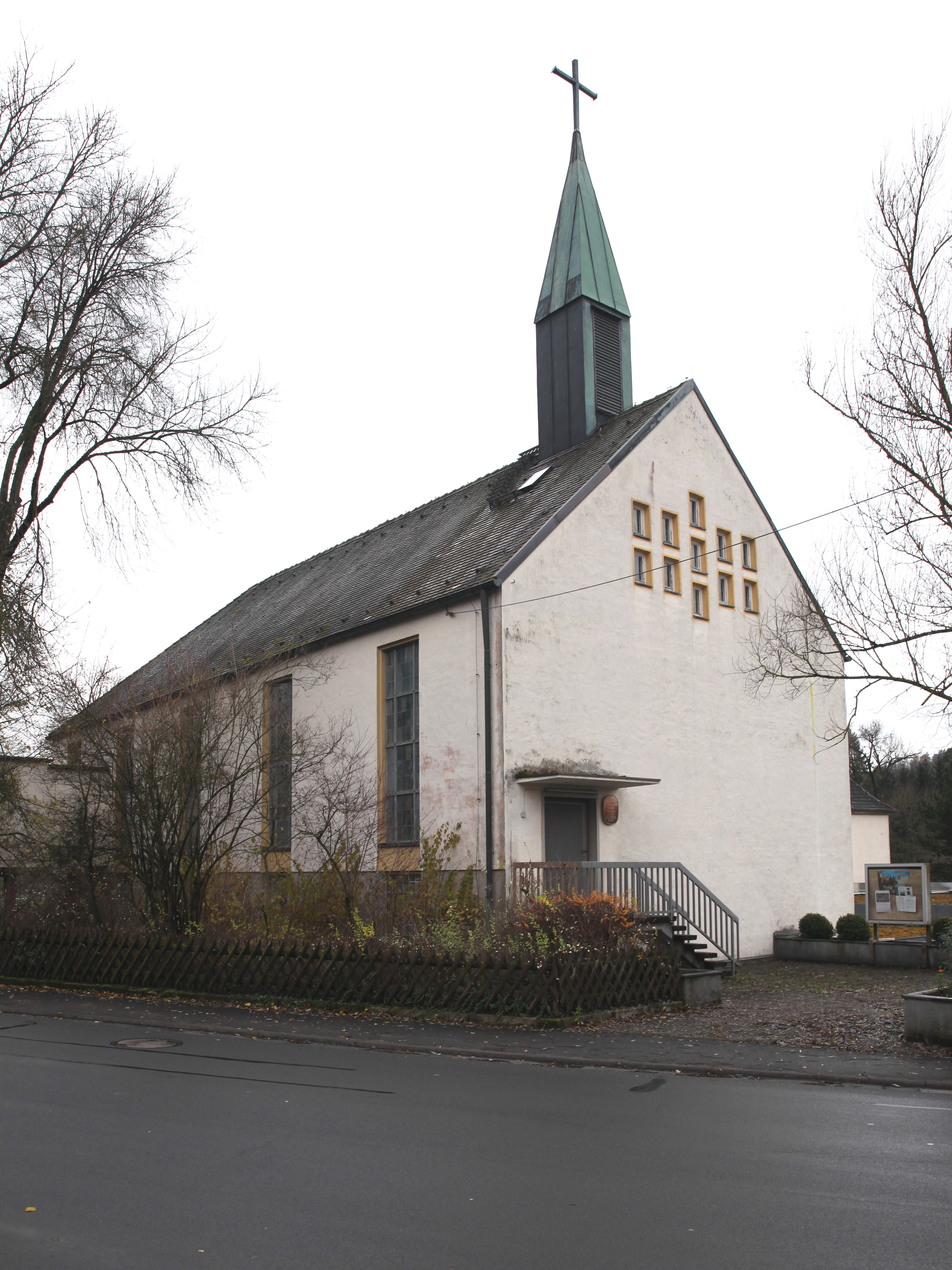 Kath. Heimkirche Dominikus-Savio in Pfaffendorf